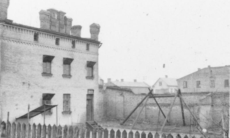 Riga, Februar 1944 Galgen im Rigaer Ghetto Einsatzstab Reichsleiter Rosenberg für die besetzten Gebiete - Hauptarbeitsgruppe Ostland Film 111/4